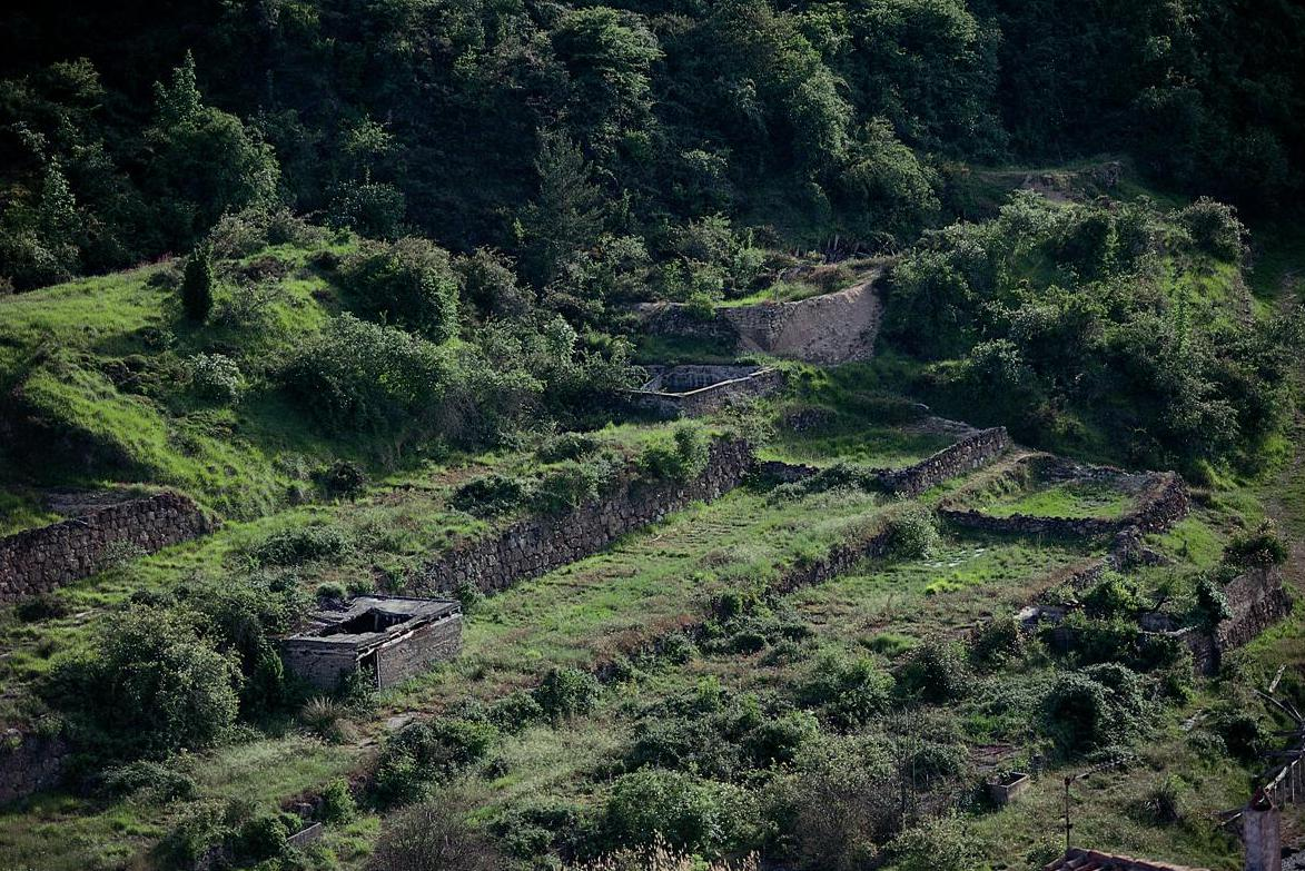 Imagen en la que se aprecian las antiguas salinas cubiertas de vegetación tras su abandono